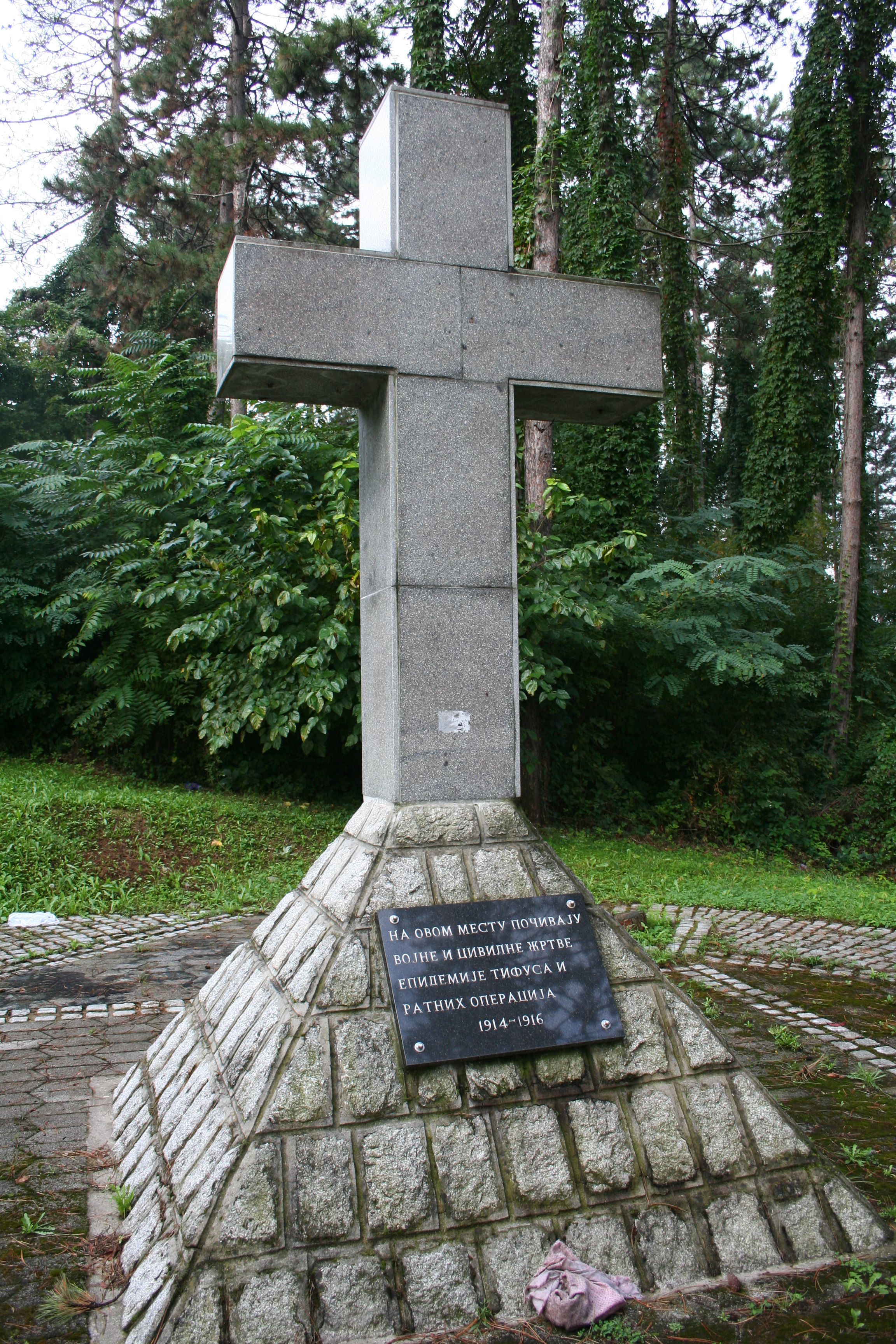 Spomenici Valjevo